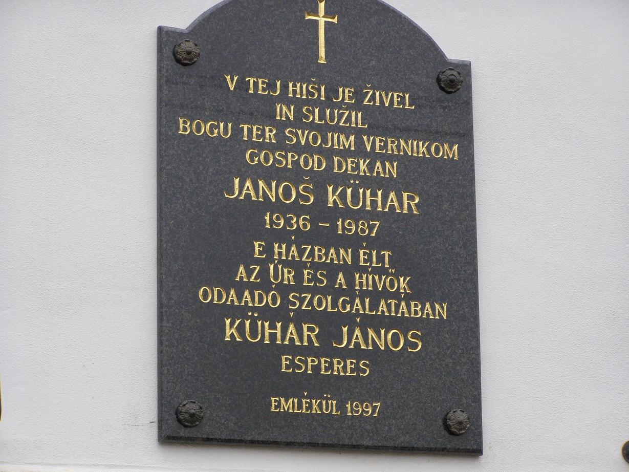 Memorial tablet of Priest János Kühár in Felsőszölnök